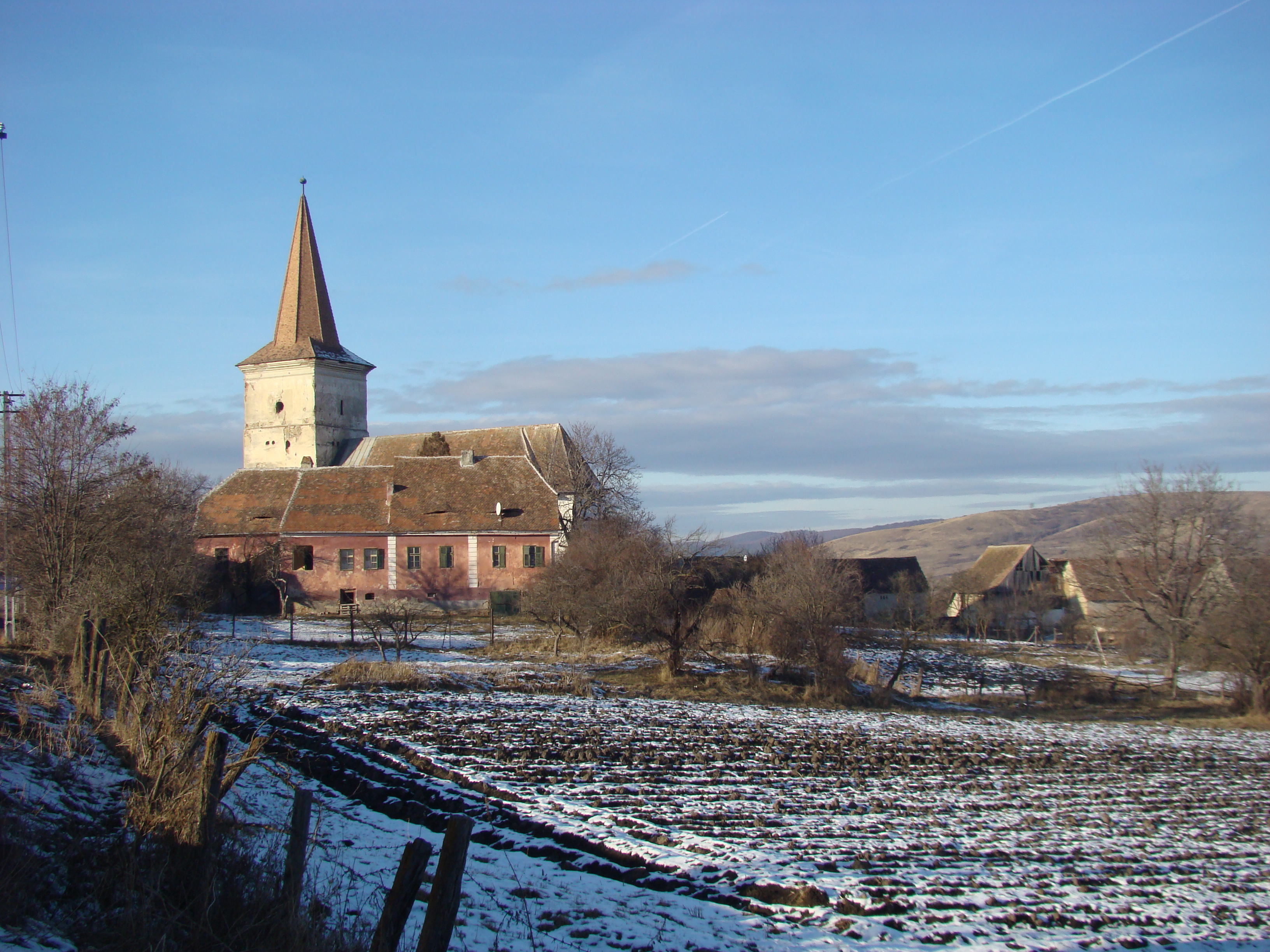 Biserica evanghelică fortificată din Nou, județul Sibiu